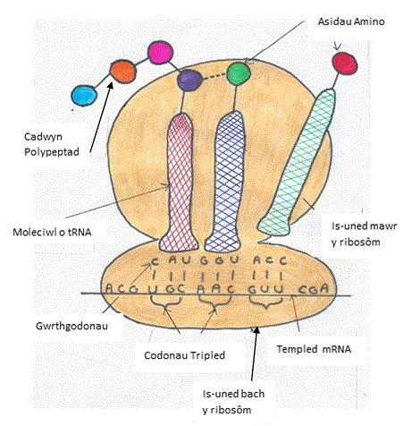 Trosiad. Y broses o ddefnyddio gwybodaeth o'r templed mRNA i ffurfio protein. Mae hyn yn digwydd ar y ribosom.